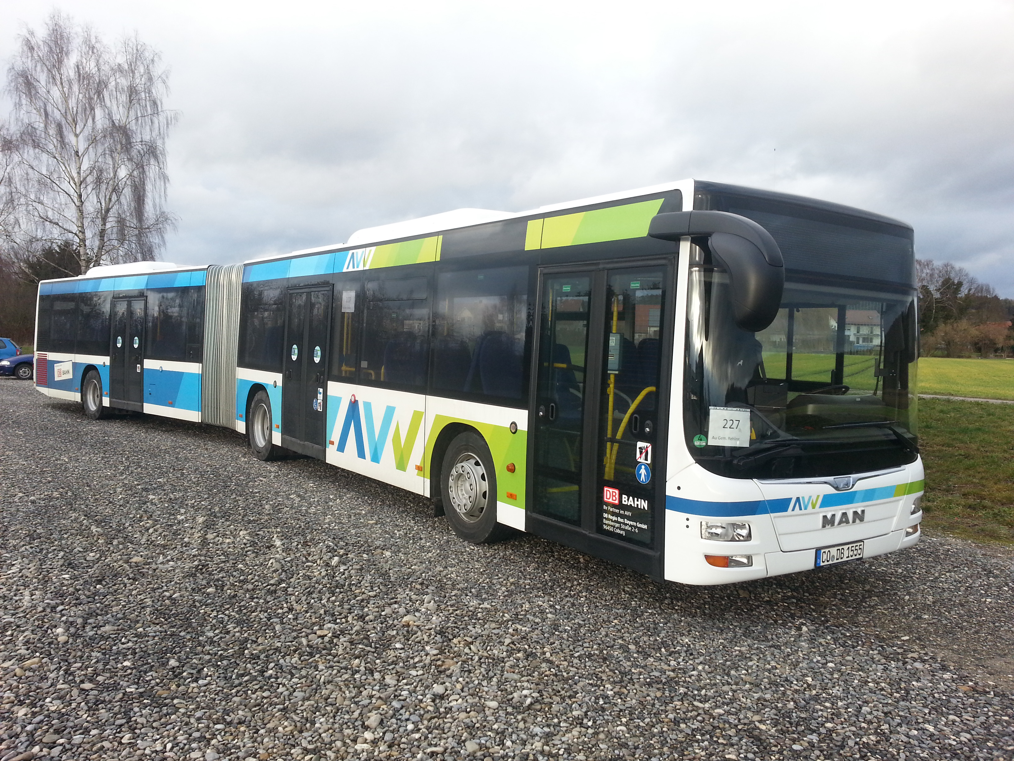 DRB-Gelenkbus im AVV